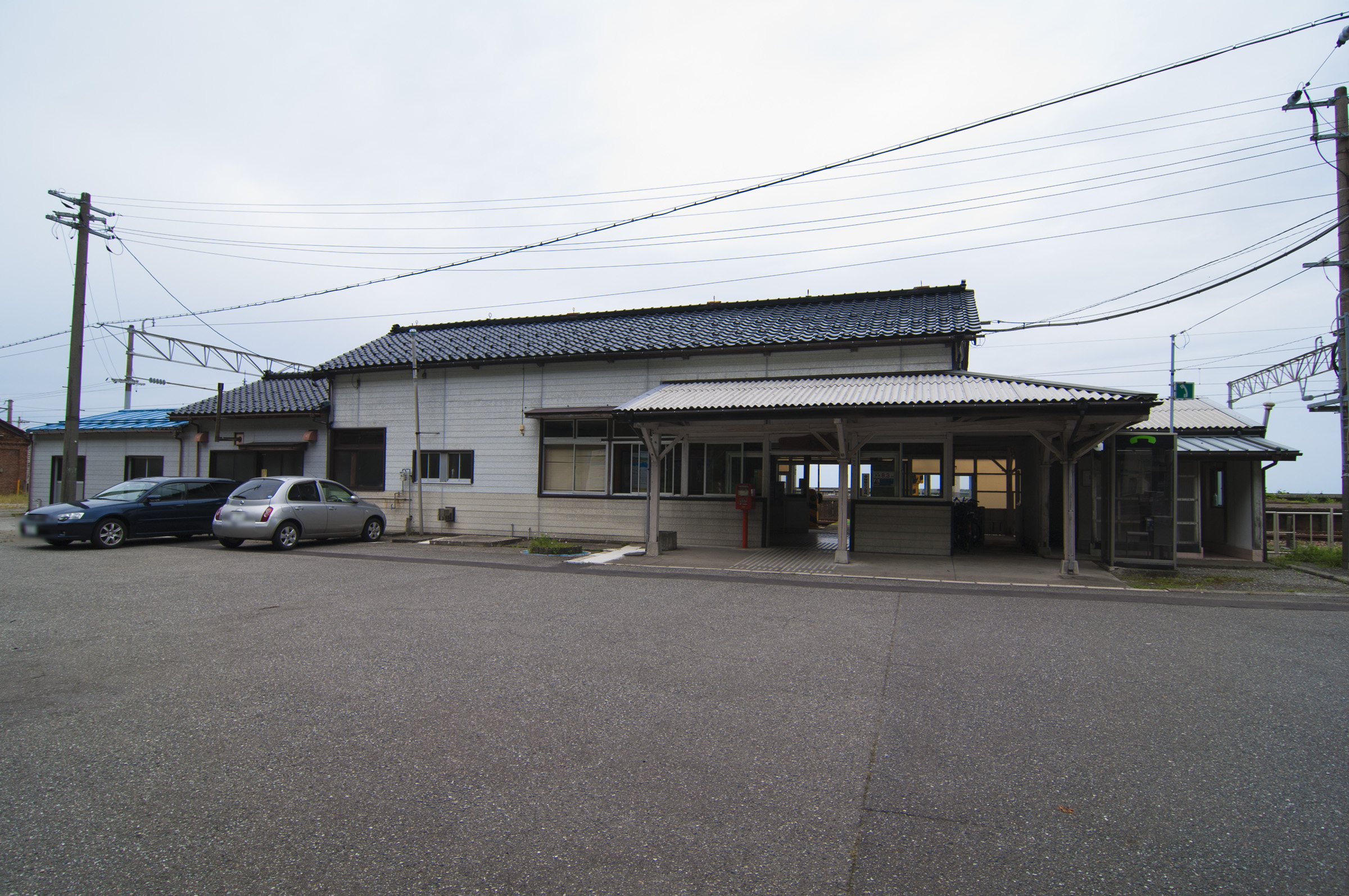 西日本旅客鉄道株式会社北陸本線市振駅